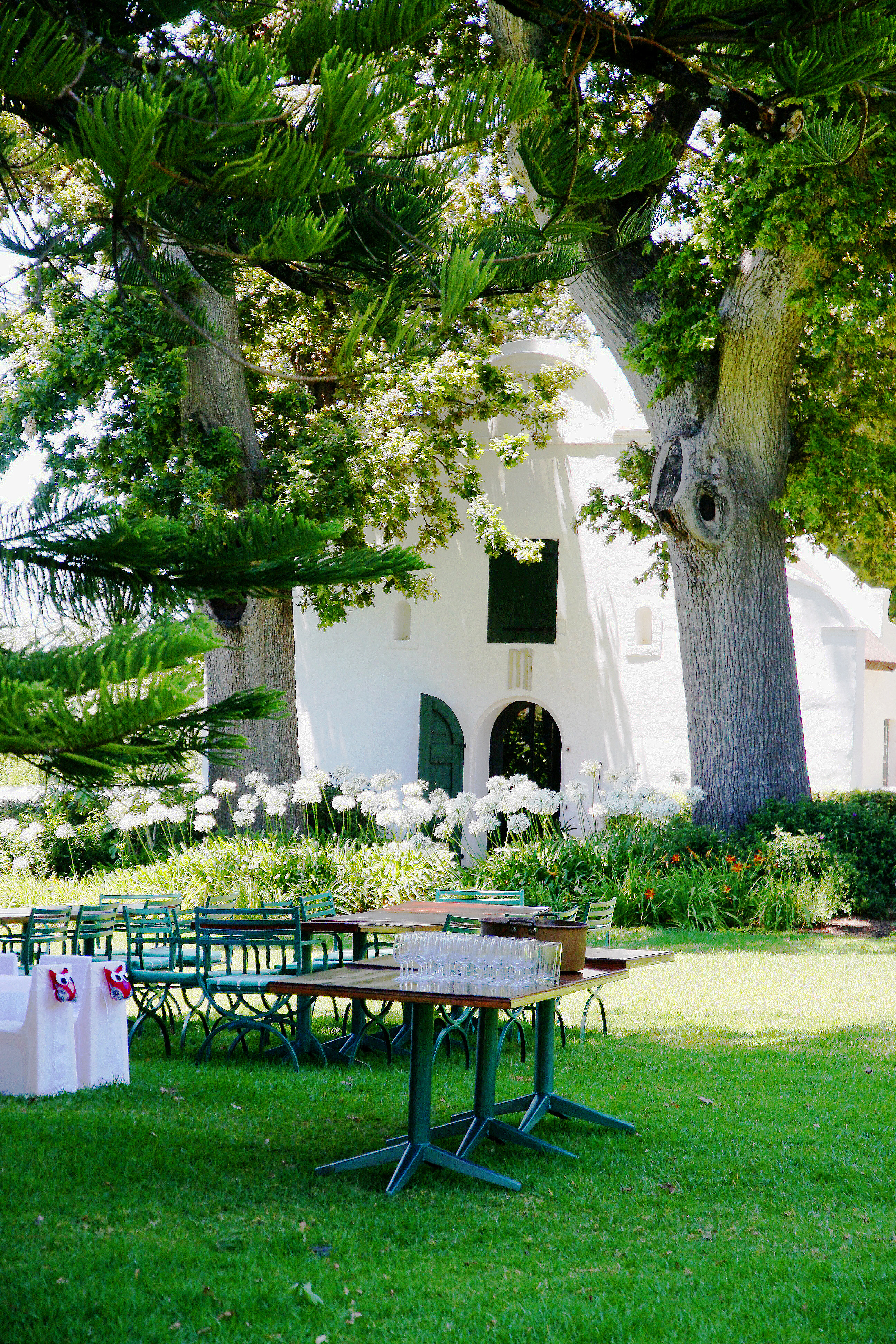 Domaine viticole de Klein Constancia Afrique du Sud